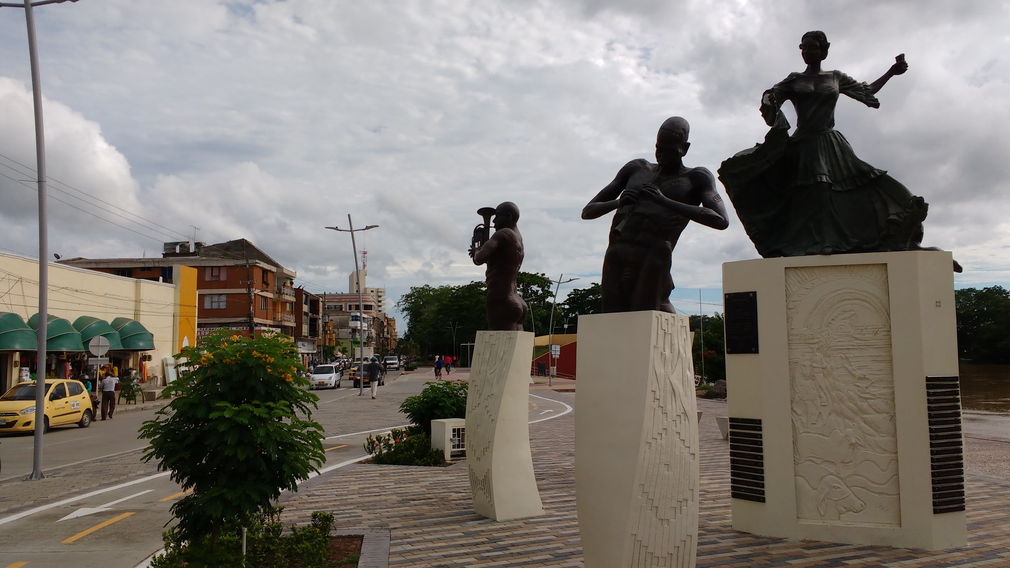 Monumento al Porro en la Plaza Cultural del Sinú.